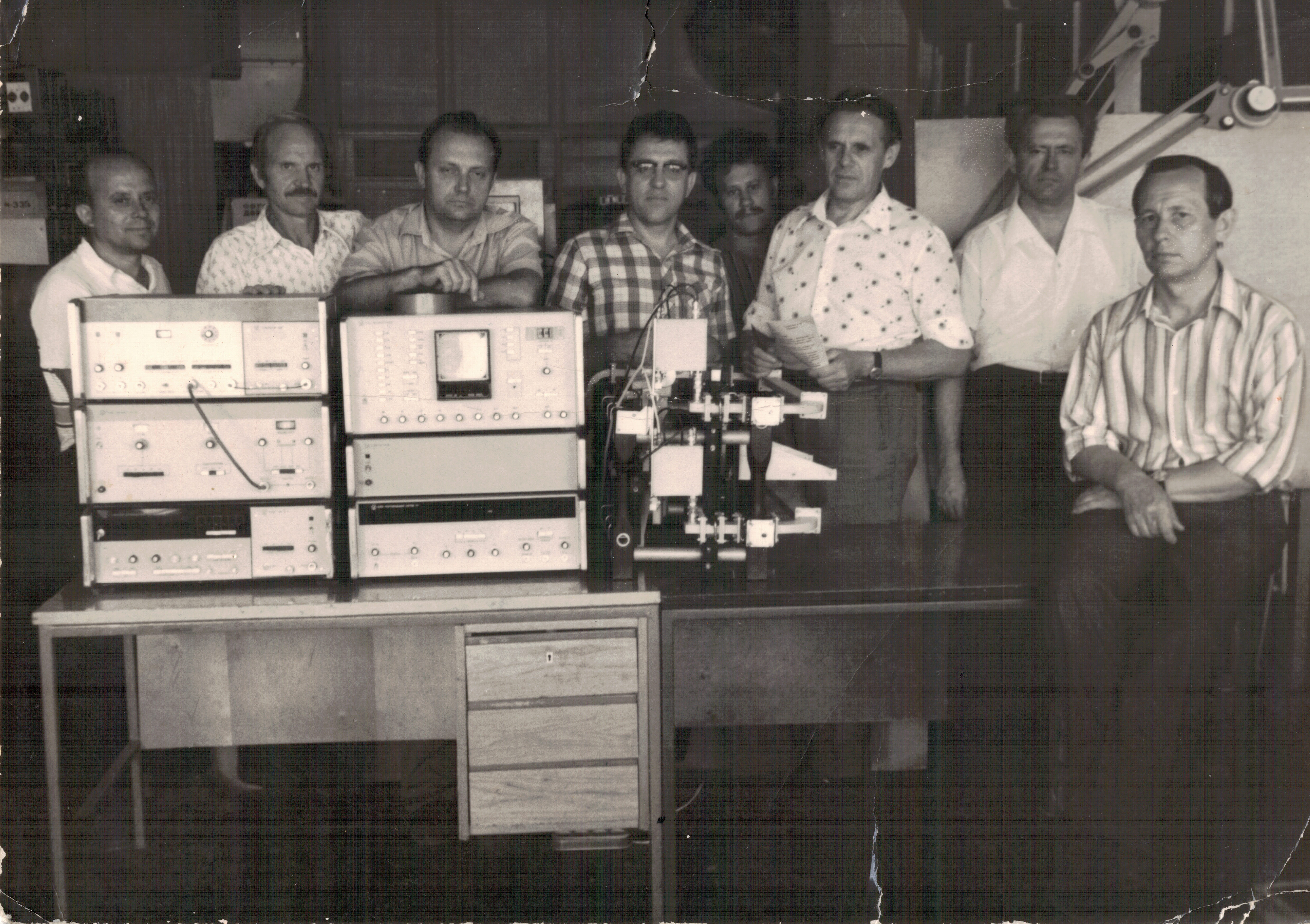 Измерительный комплекс для анализа СВЧ-устройств с преобразованием частоты. В центре - главный конструктор К.С. Коротков, Краснодарское КБ радиоаппаратуры, 1970-e годы.